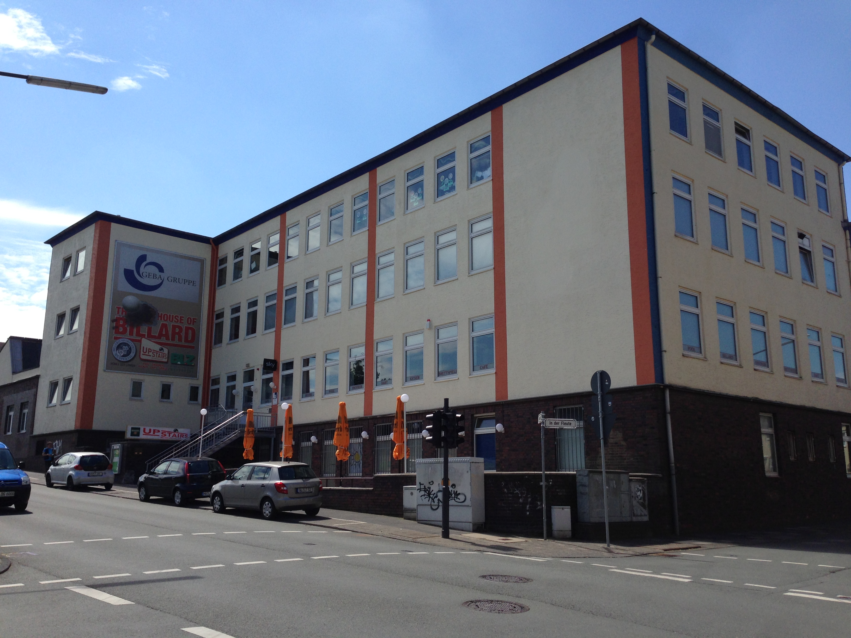 Vereinsheim des "Billard Sportvereins Wuppertal 1929" an der Clausewitzstraße.